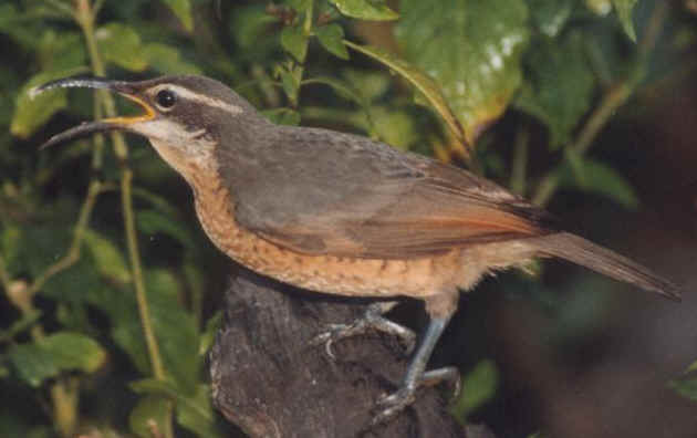 Female Victoria's Riflebird (Ptiloris victoriae)